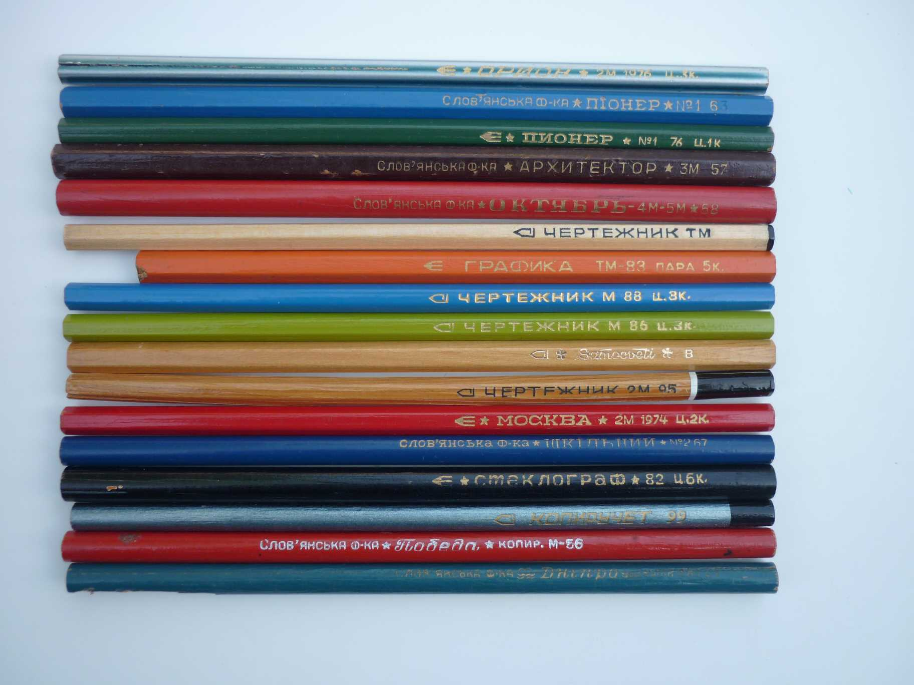 Взірці простих олівців, що випускалися Слов'янською фабрикою олівців.